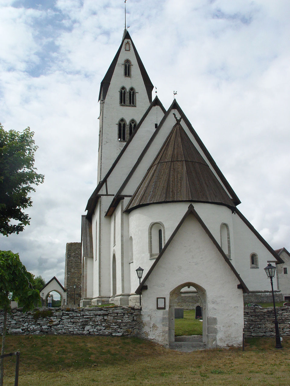 Gothems kyrka (Gotland) aus dem 13.Jh.